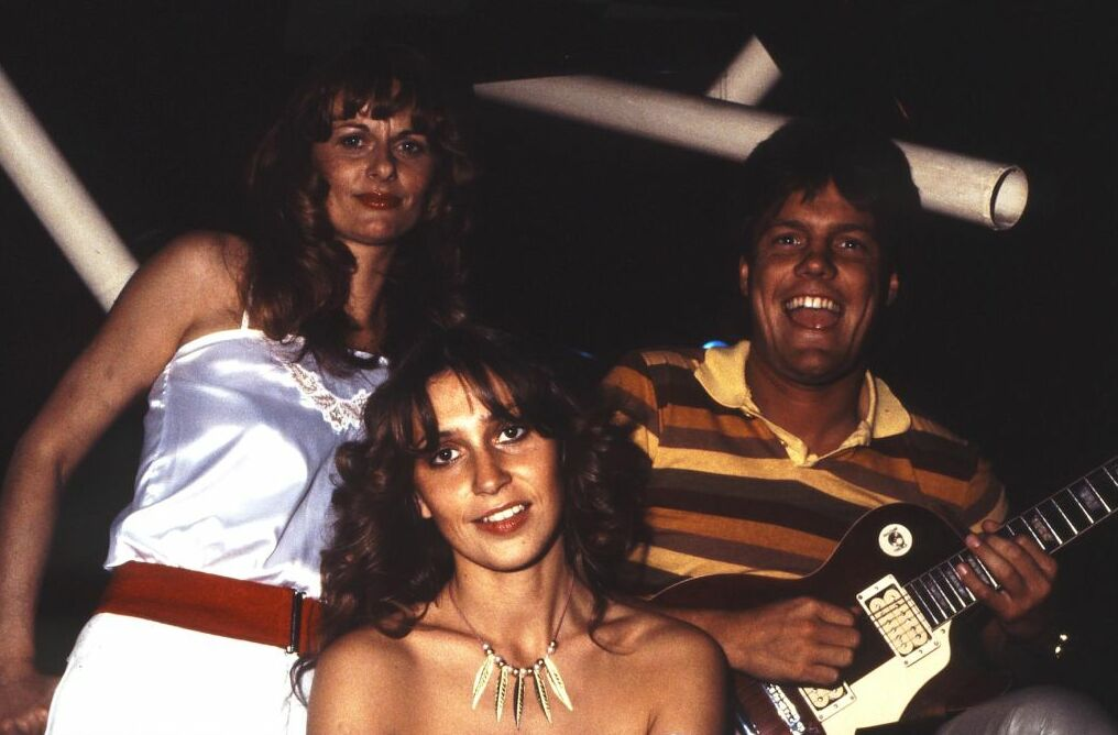 German vocal group "Sunday", 3rd castDeutsche Vokalgruppe „Sunday“, 3. Besetzung. On the right: Dieter Bohlen